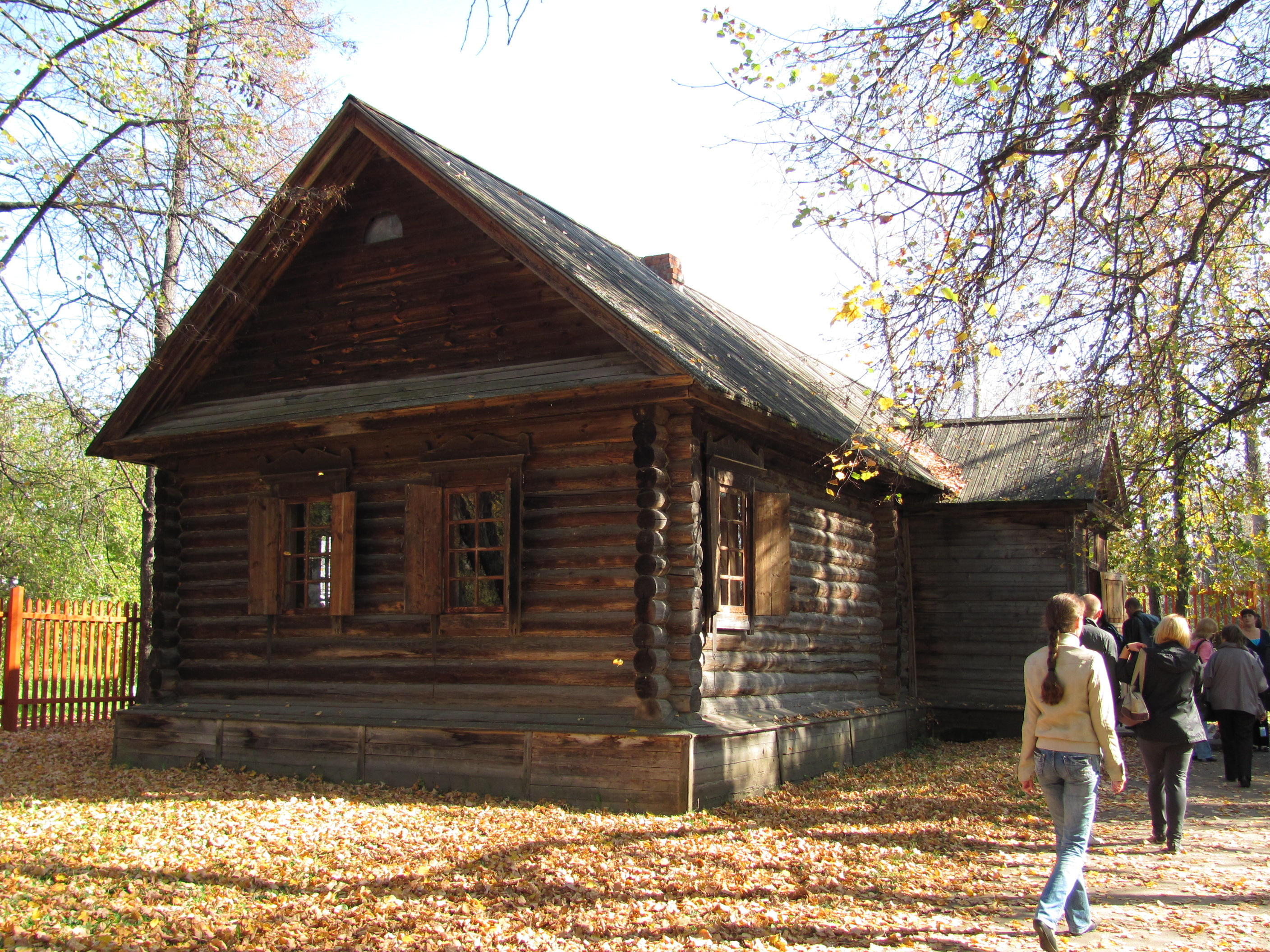 Большое Болдино. Музей А. С. Пушкина, вотчинная контора.